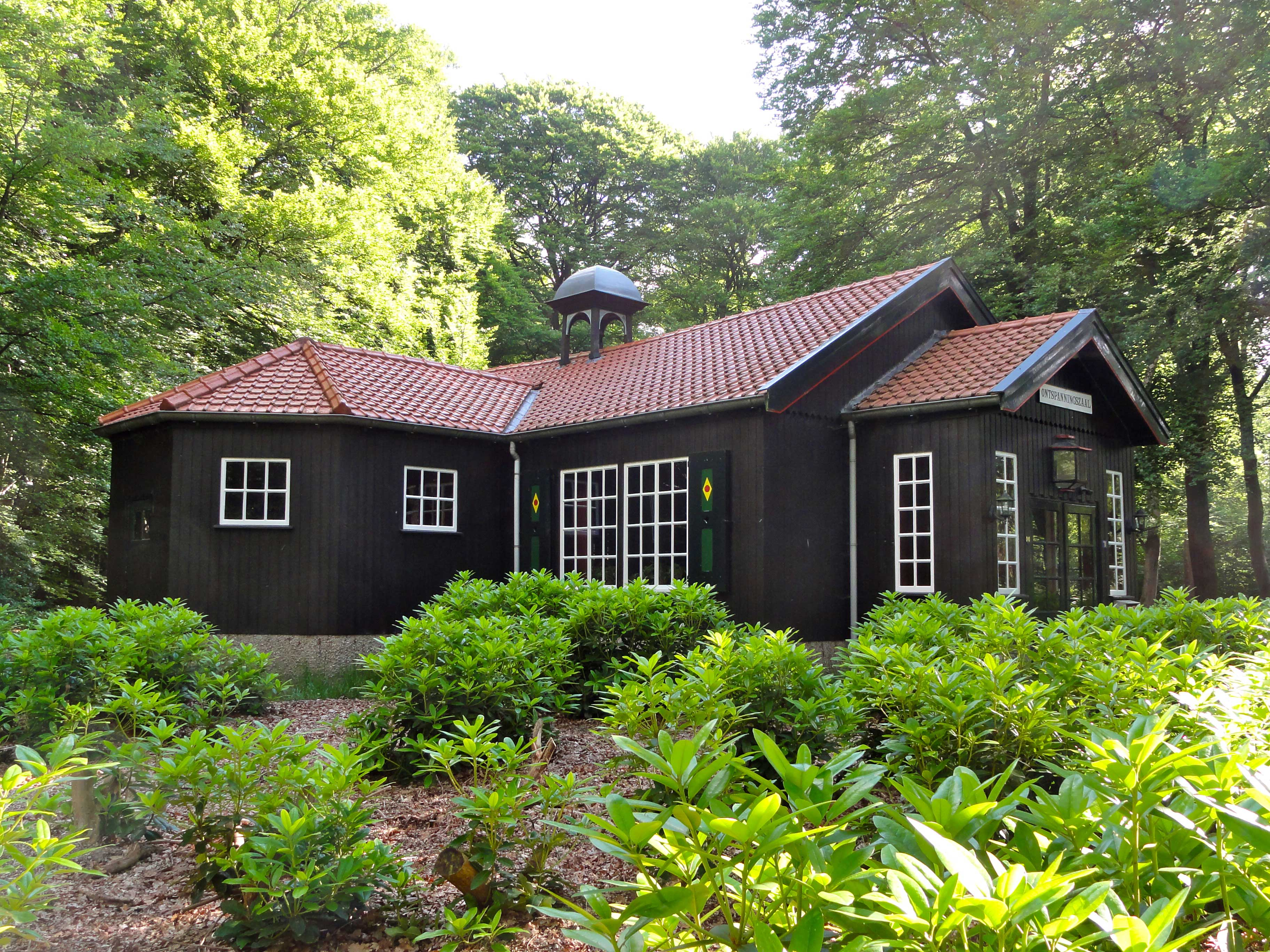 Houten Ontspanningszaal op het landgoed Staverden (zuidwestzijde)